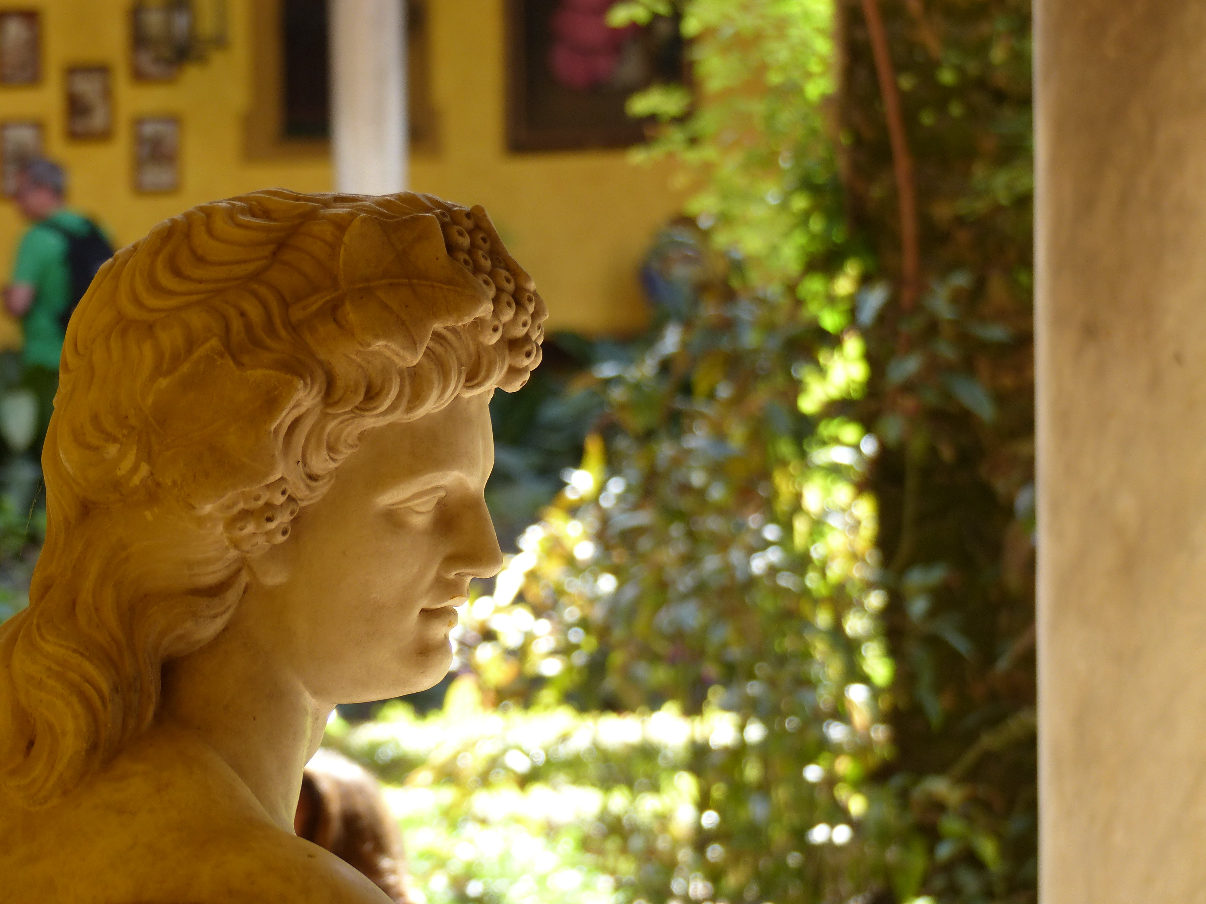 Patio central del Palacio de las Dueñas